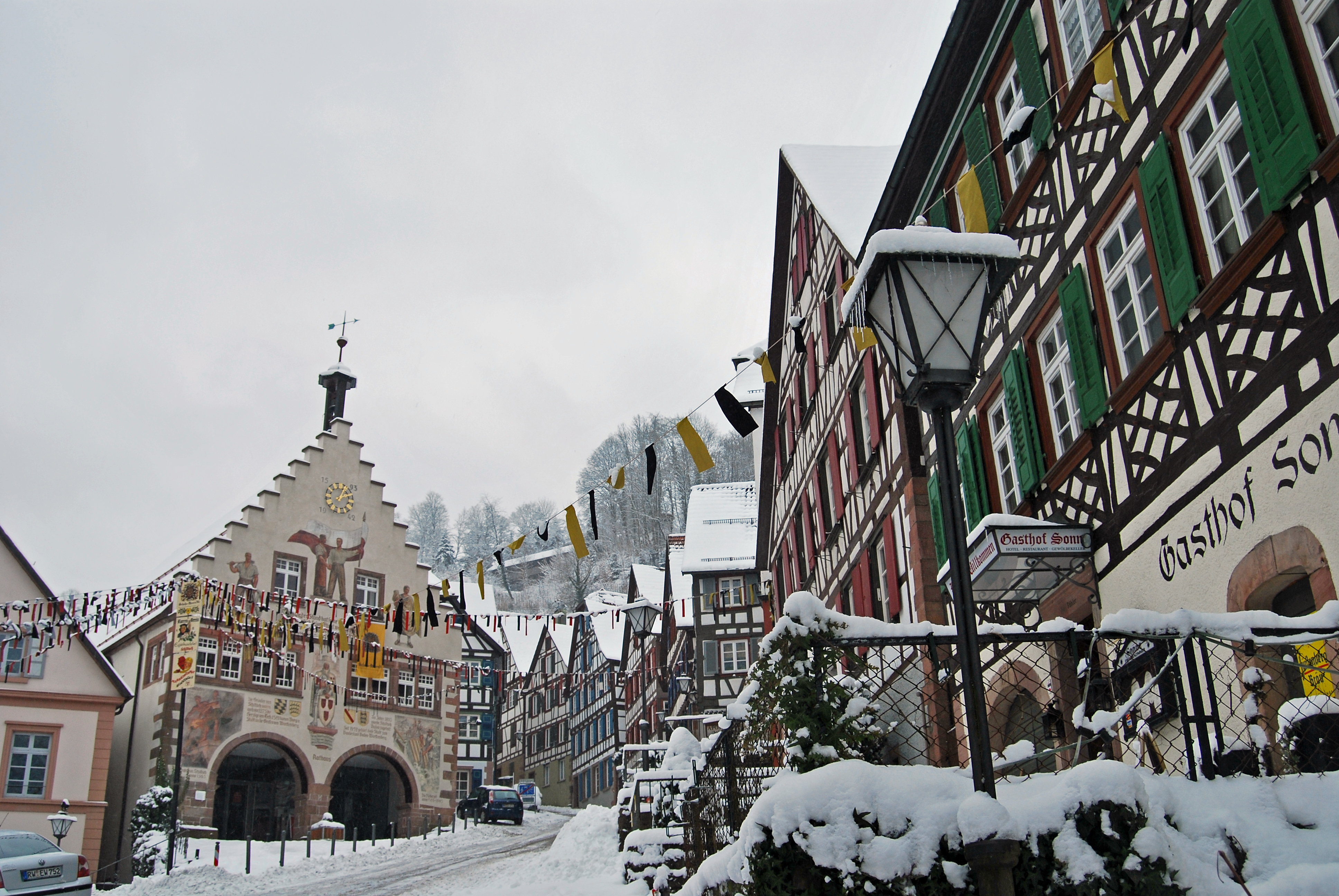 Altstadt von Schiltach im Winter